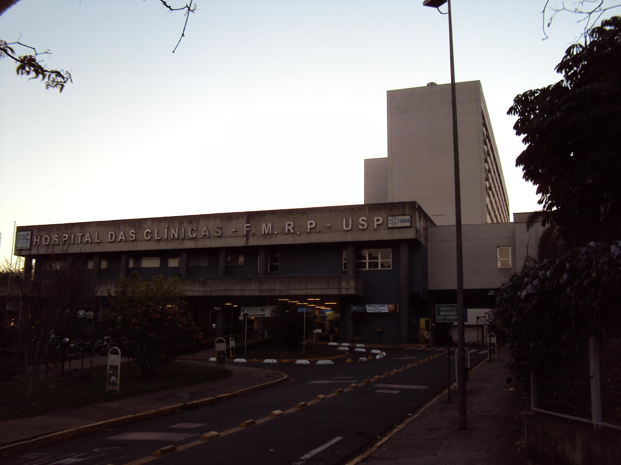 Hospital das Clínicas - FMRP